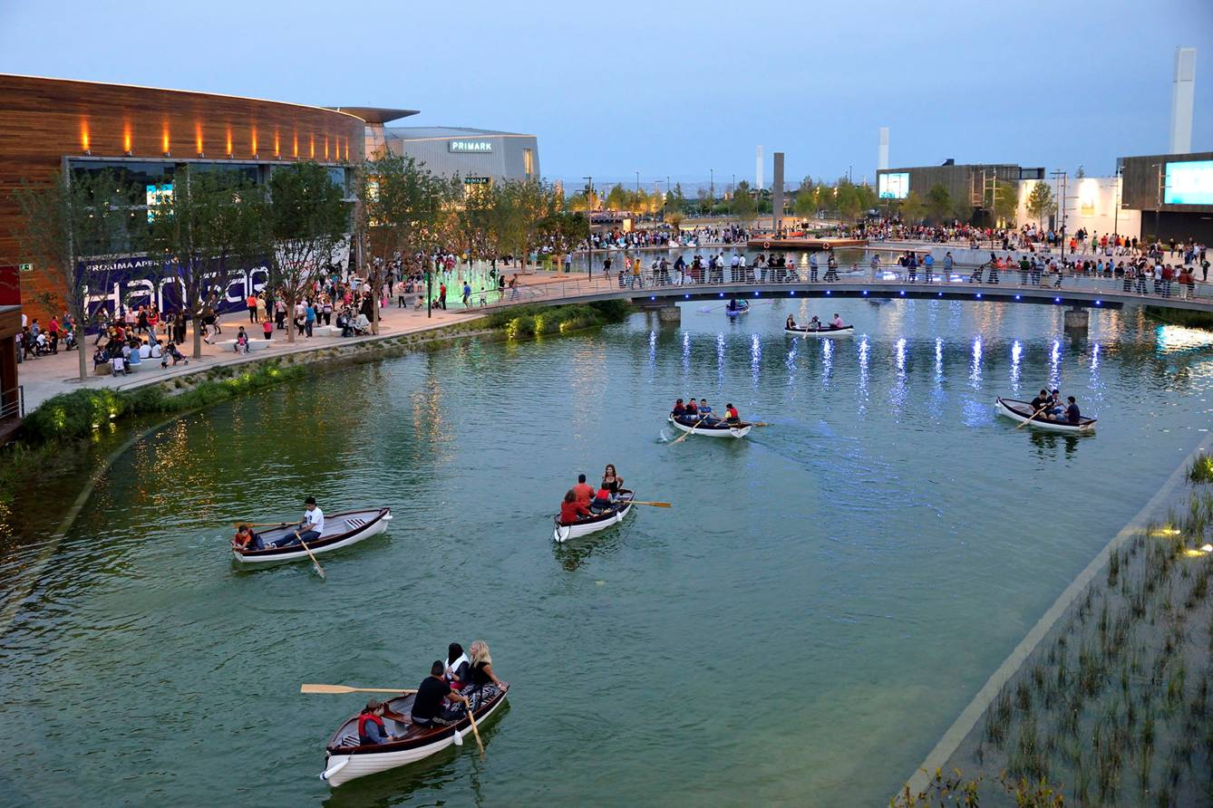 Lago Navegable al atardecer